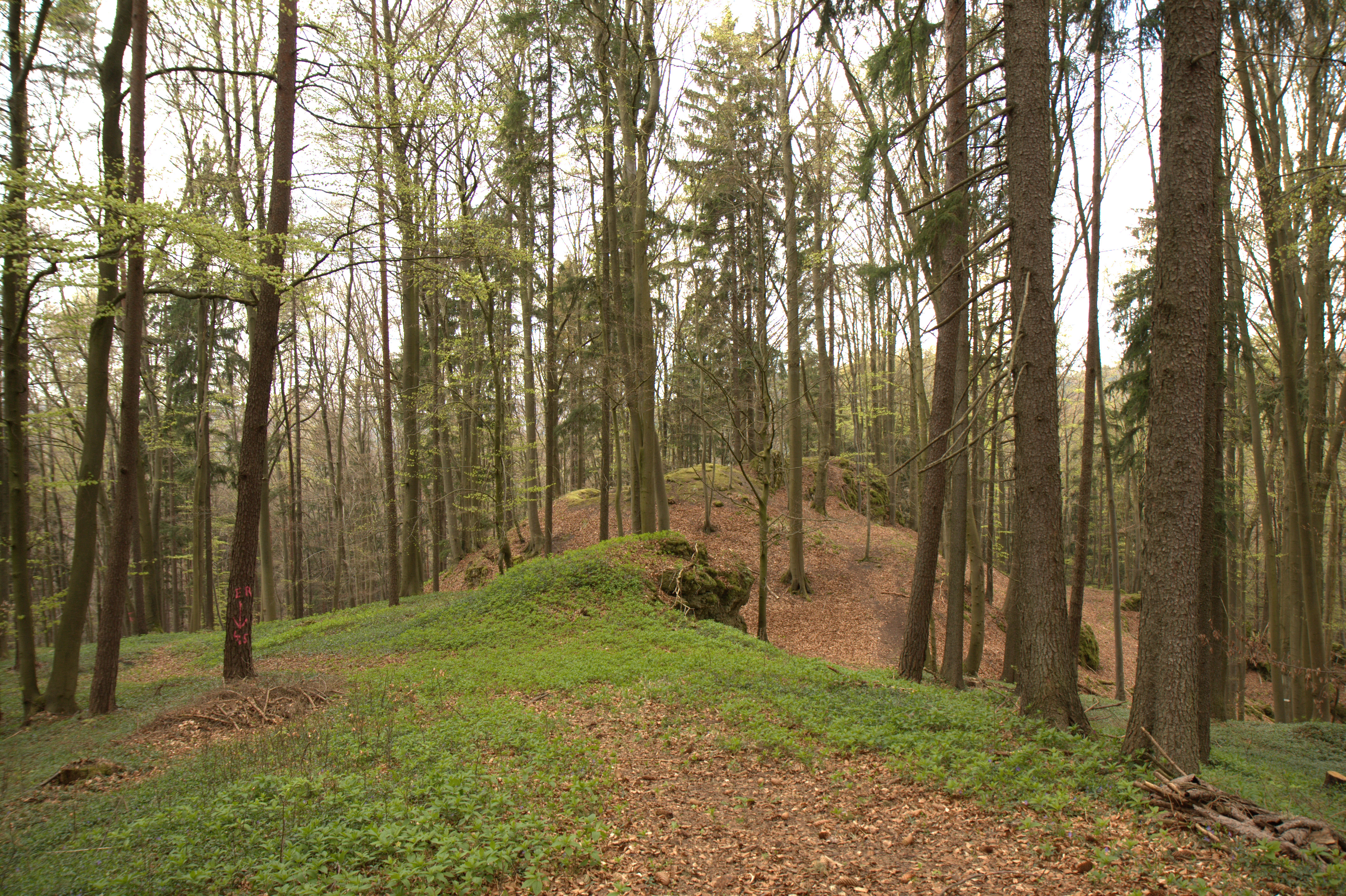 Burgstall Scharfenberg - Ansicht des Burgstalls